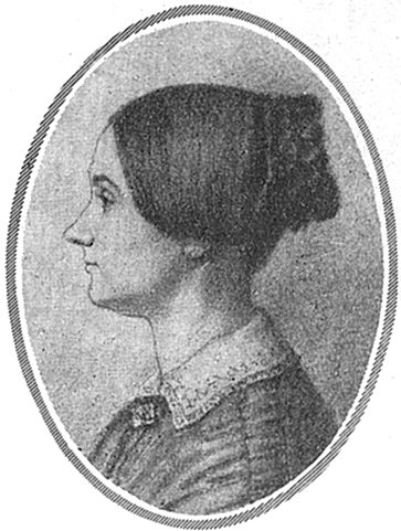 Fröken Sophie Posse. (Efter en teckning av Amalia Lindegren.)